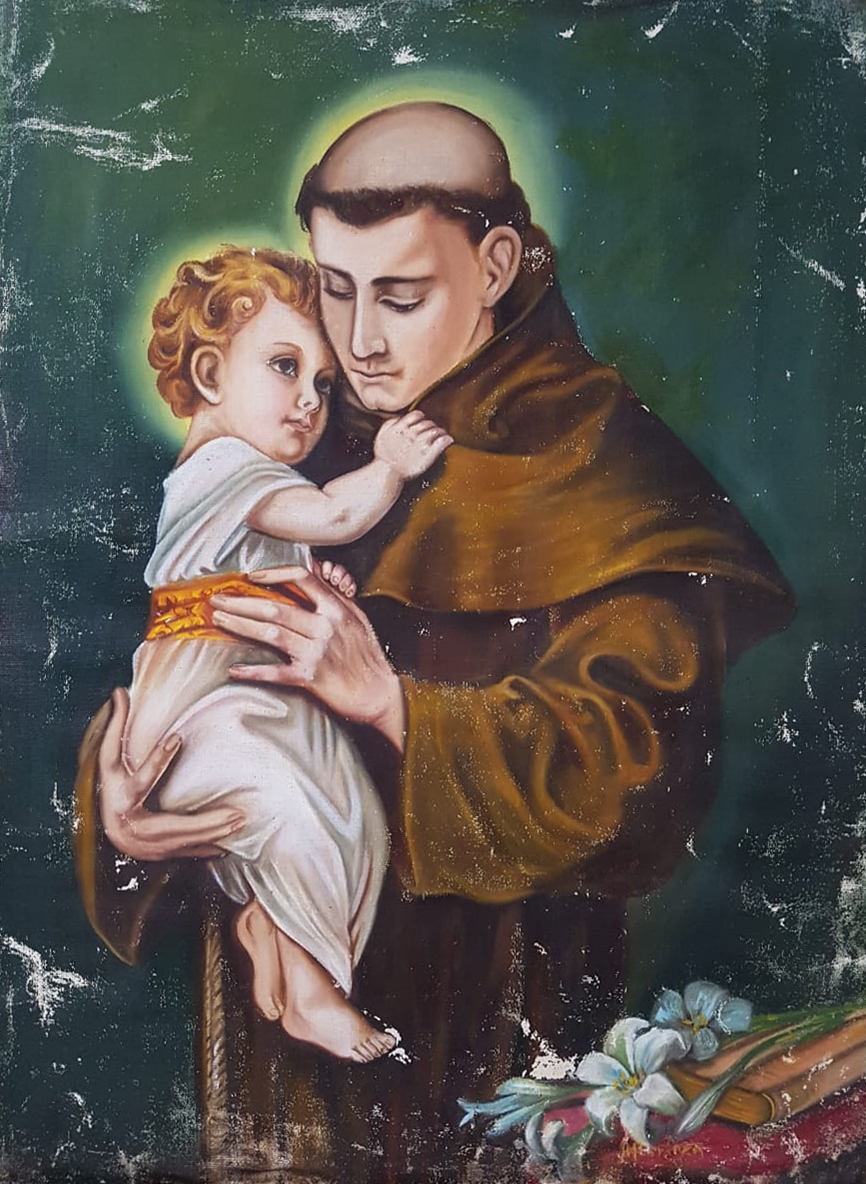 San Antonio y el niño. Oleo sobre tela, Siglo XIX. Autor anónimo. Propiedad de la familia Maldonado